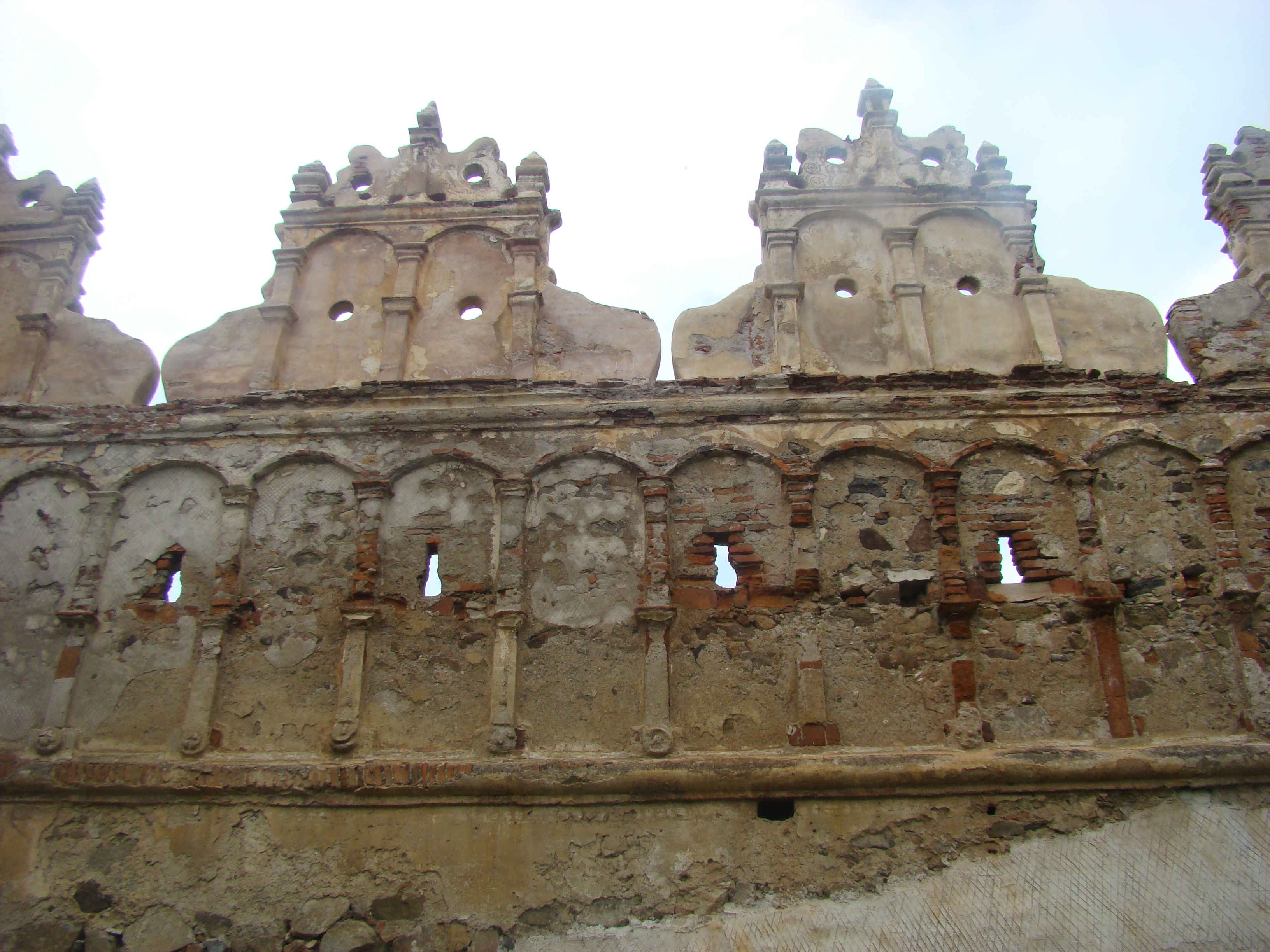 Lăzarea, județul Harghita